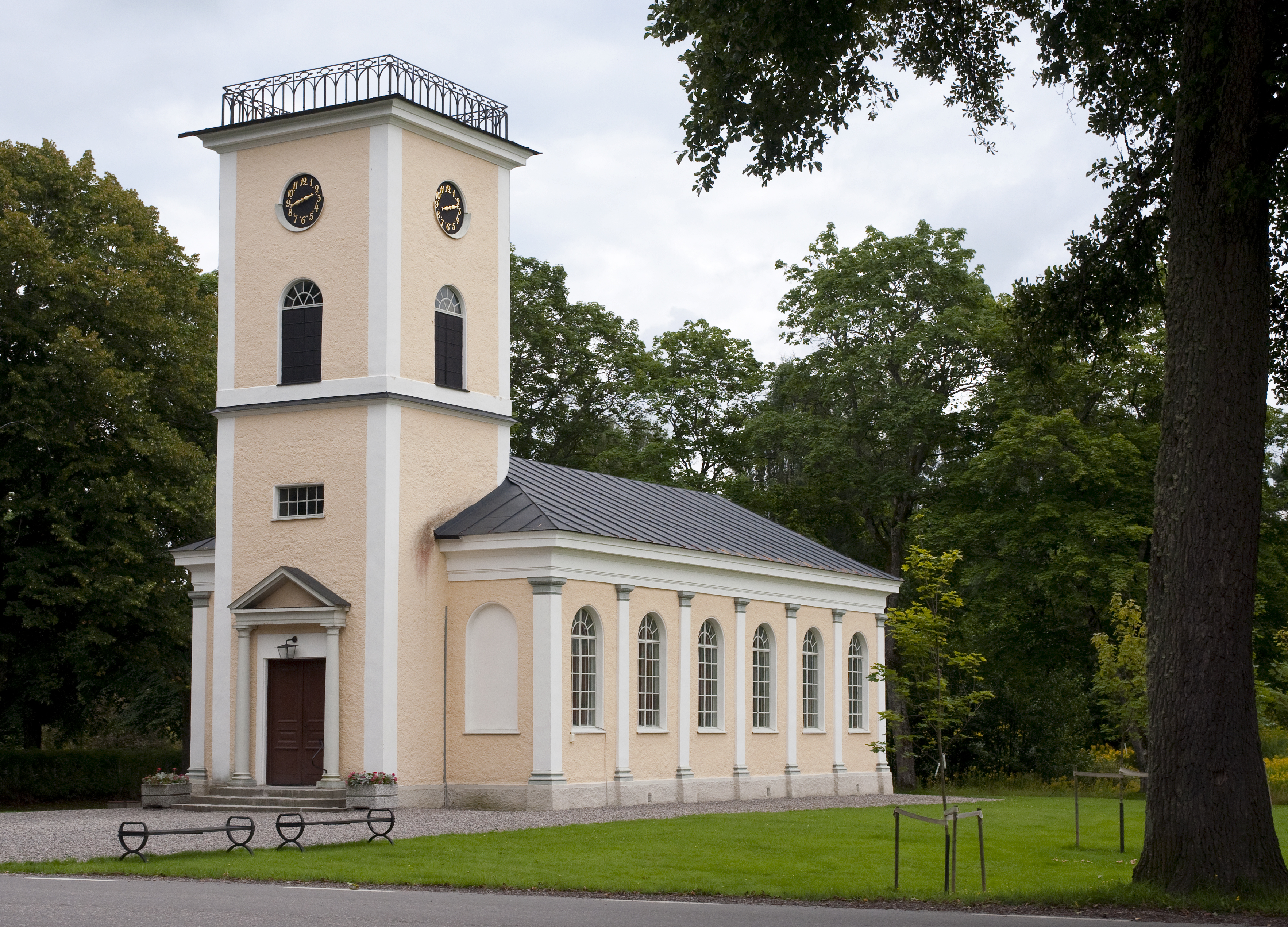 Brevens kyrka i Brevens bruk, Askers församling i Örebro län.